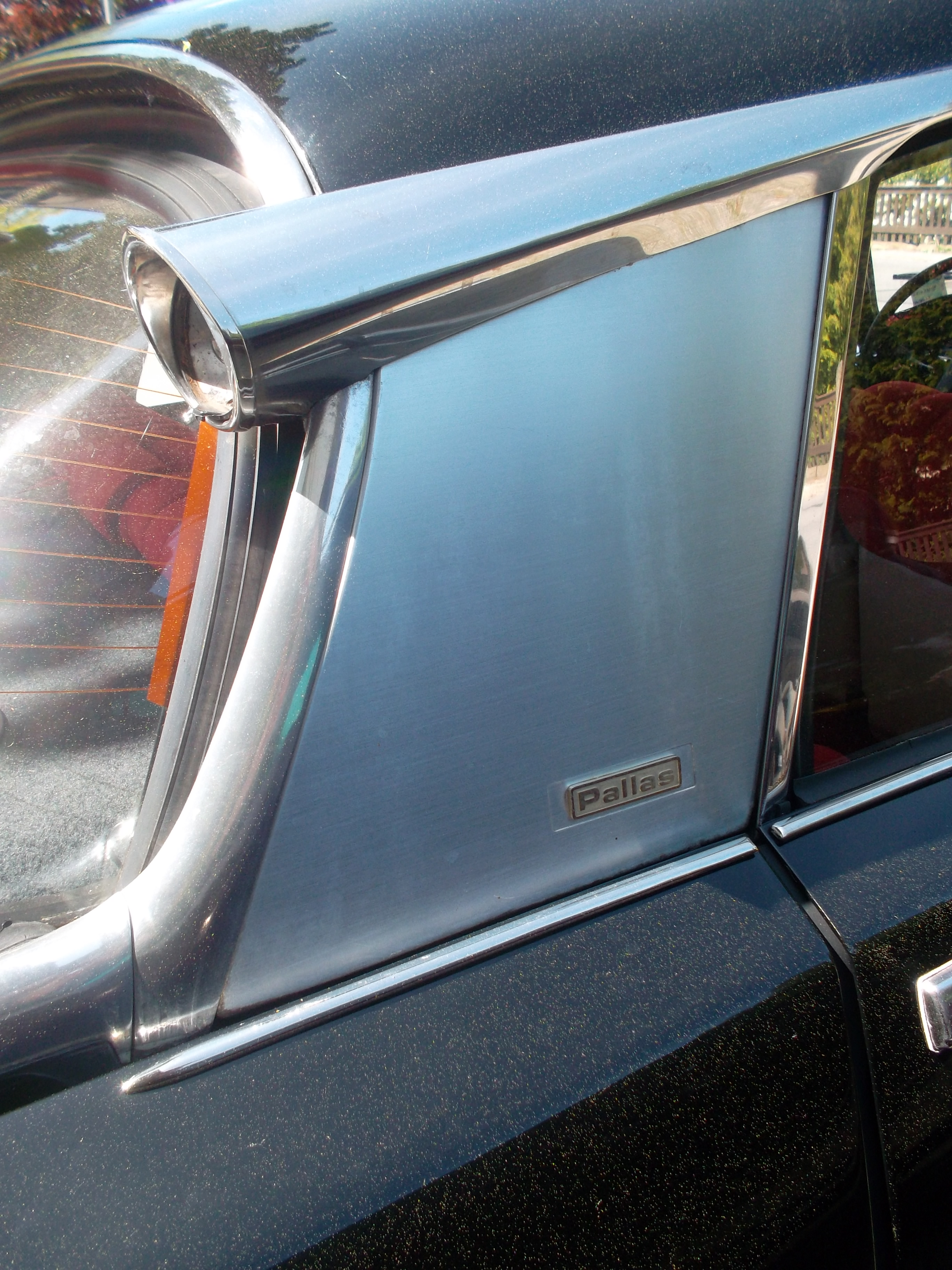 Blick auf die breite C-Säule des Citroën DS Pallas